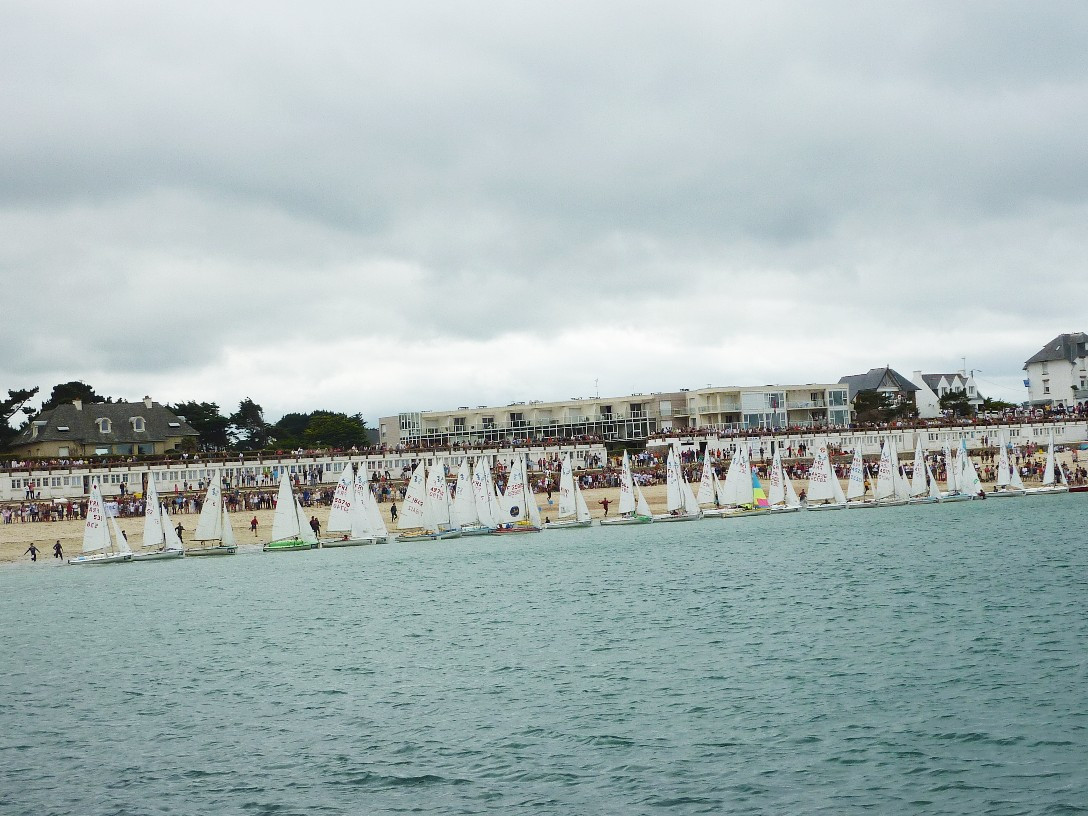 départ des 24h de la voile 2010